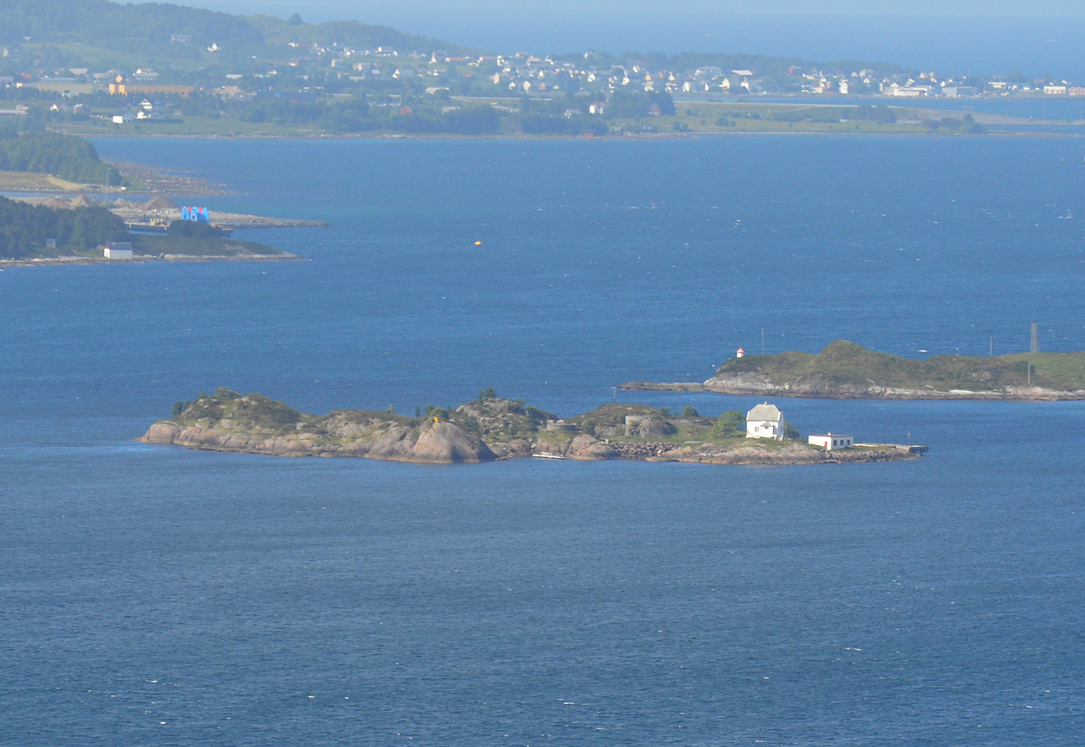 Kjeholmen